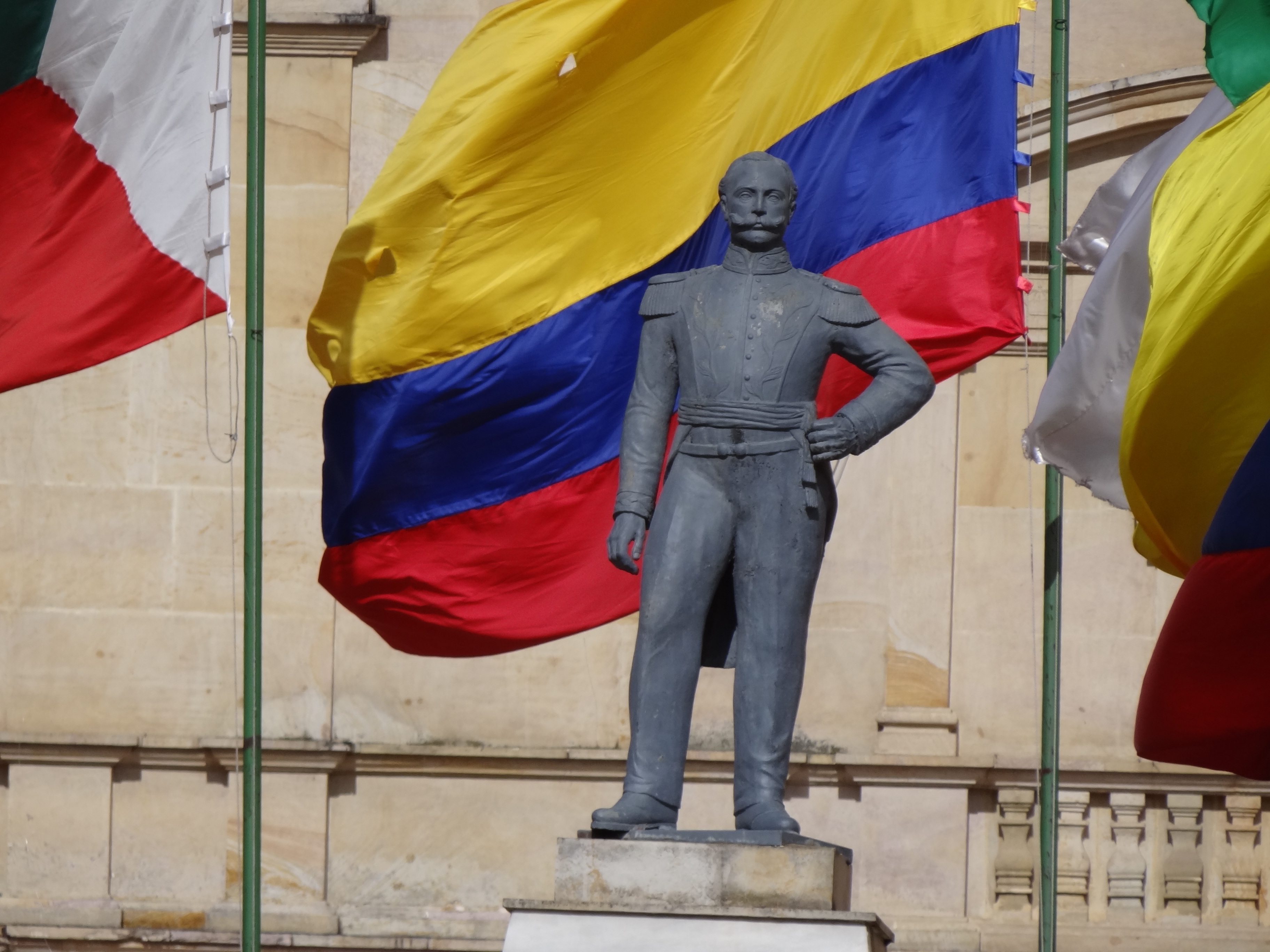 Estatua de Rafael Reyes, municipio de Santa Rosa de Viterbo, departamento de Boyacá, Colombia